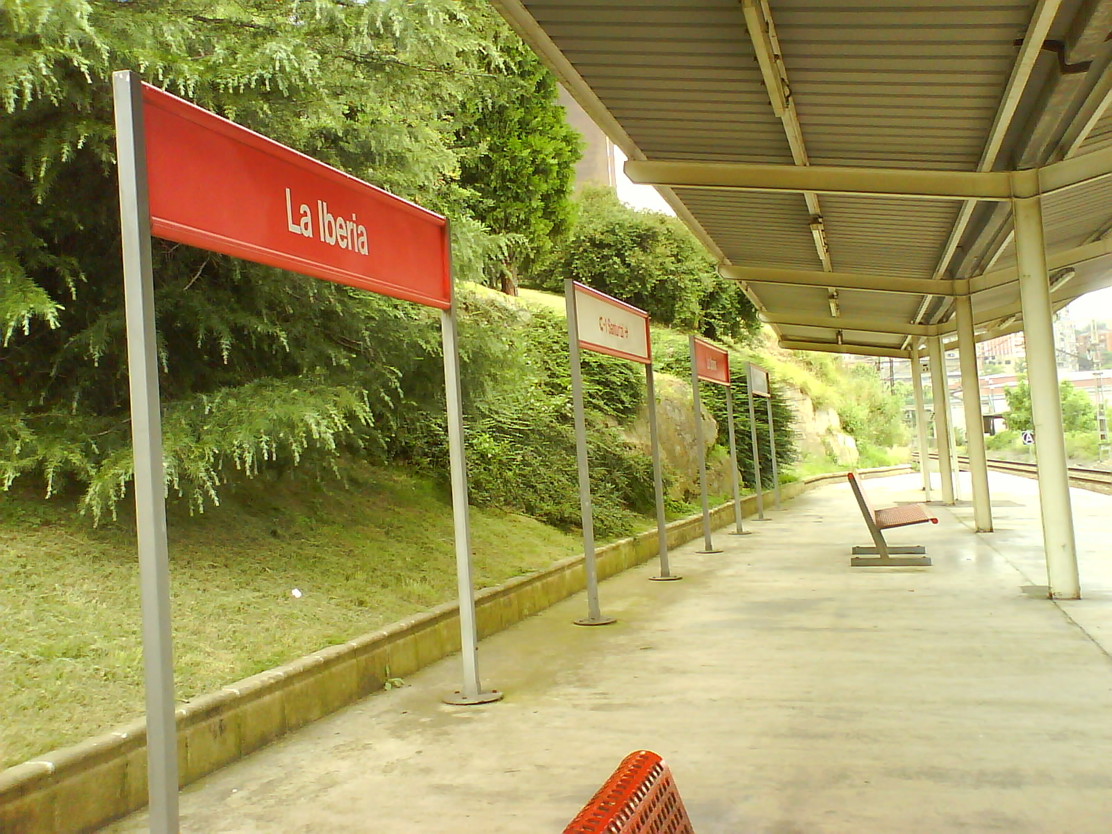 estación de La Iberia de renfe Cercanías bilbao